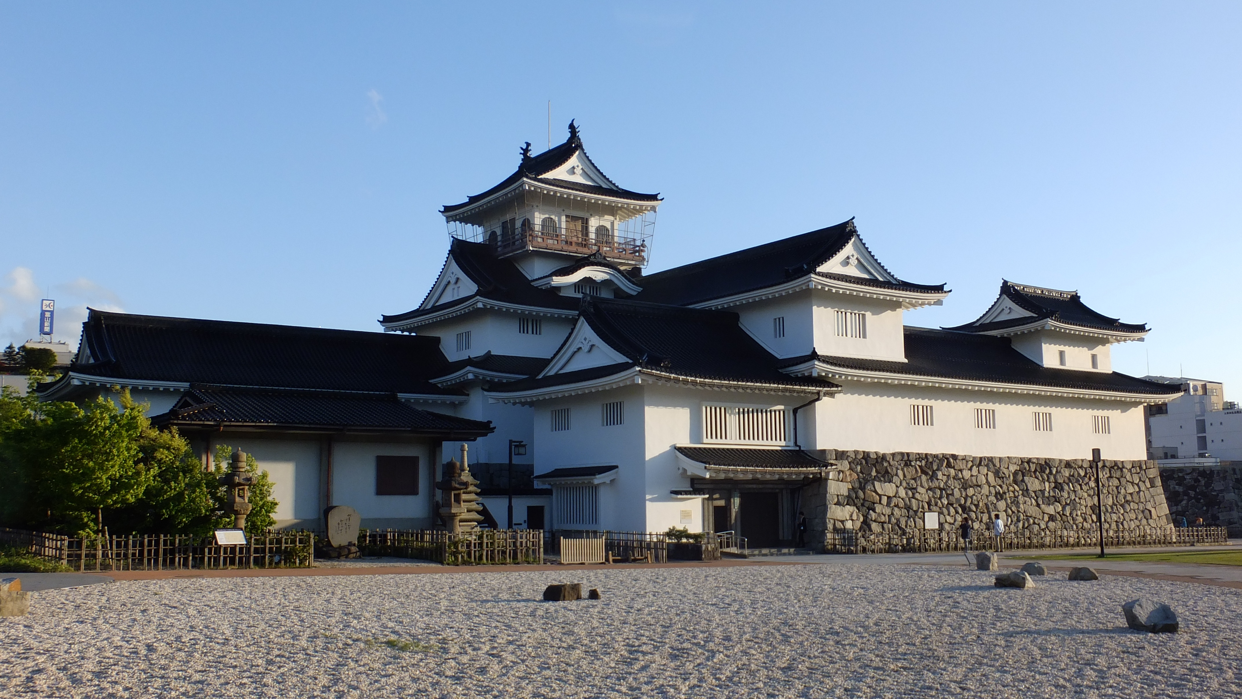 富山市郷土博物館（富山城復元模擬天守）